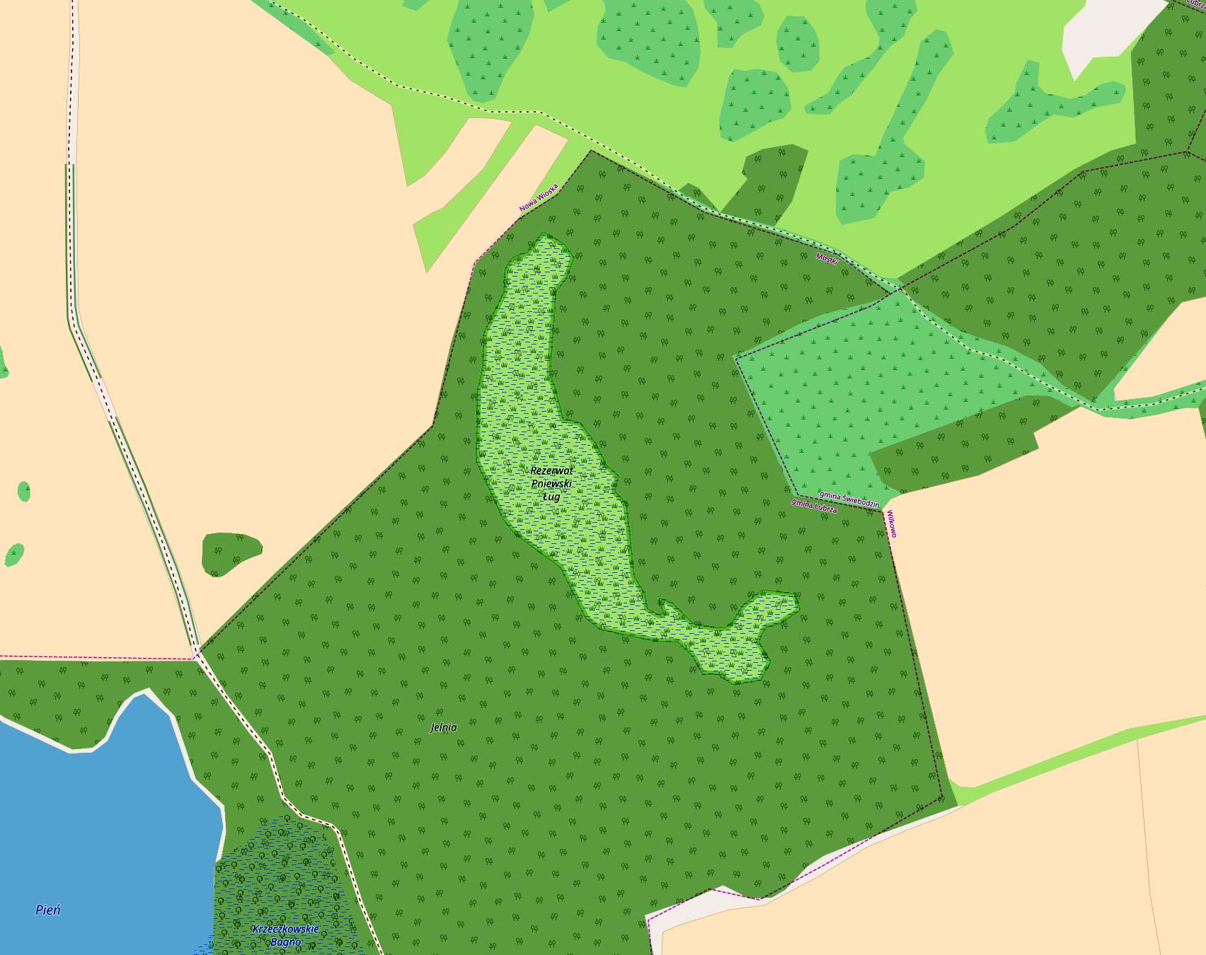 Rezerwat Pniewski Ług widok